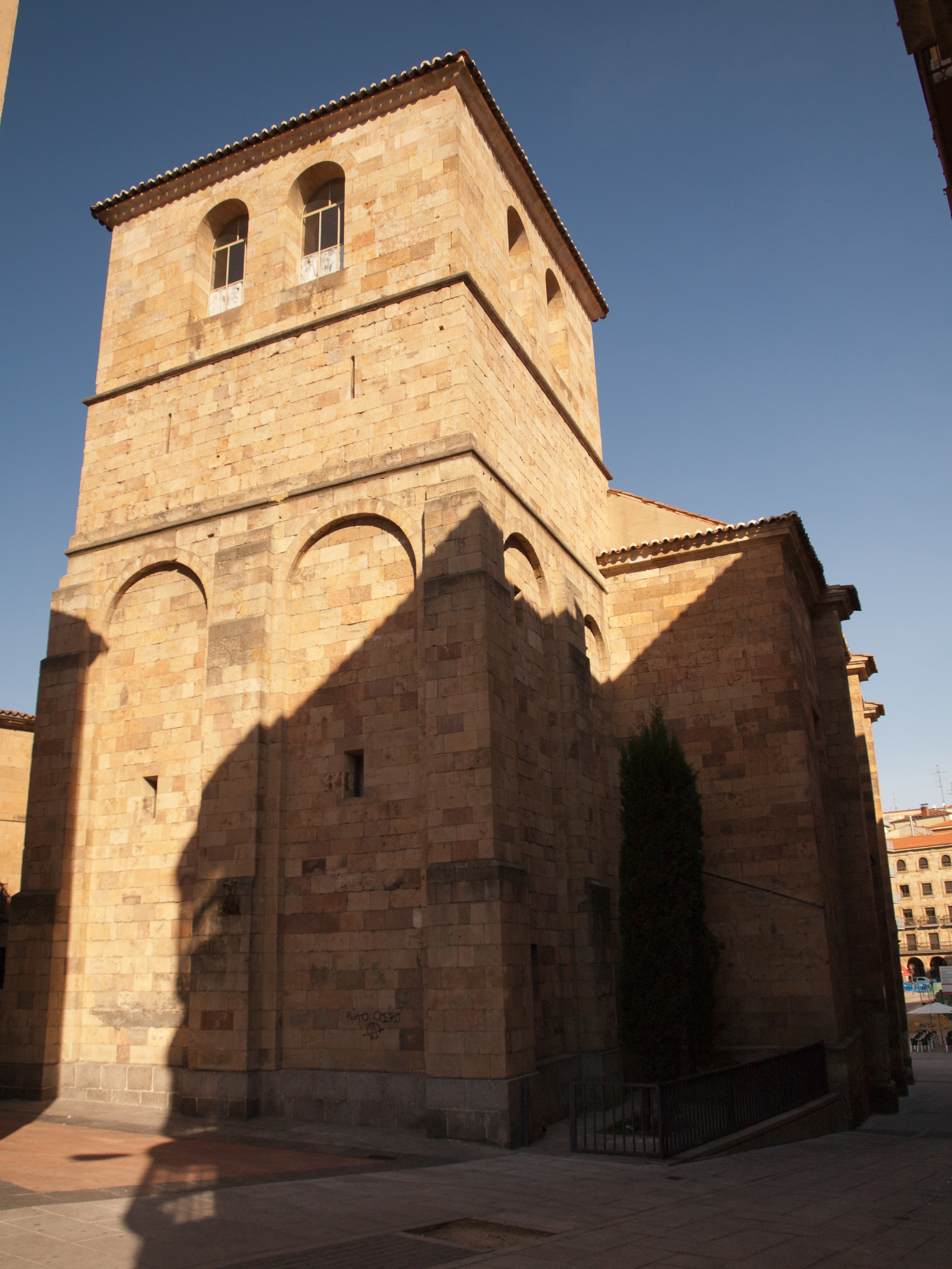 Vista lateral de Parroquia de San Julián